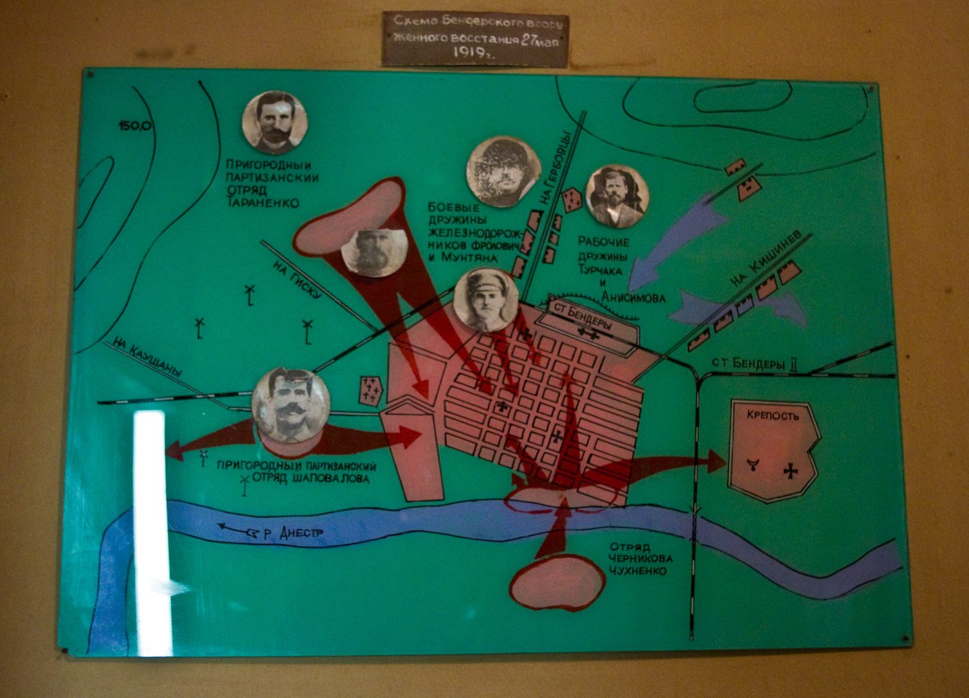 Схема Бендерского вооружённого восстания 27 мая 1919 года.